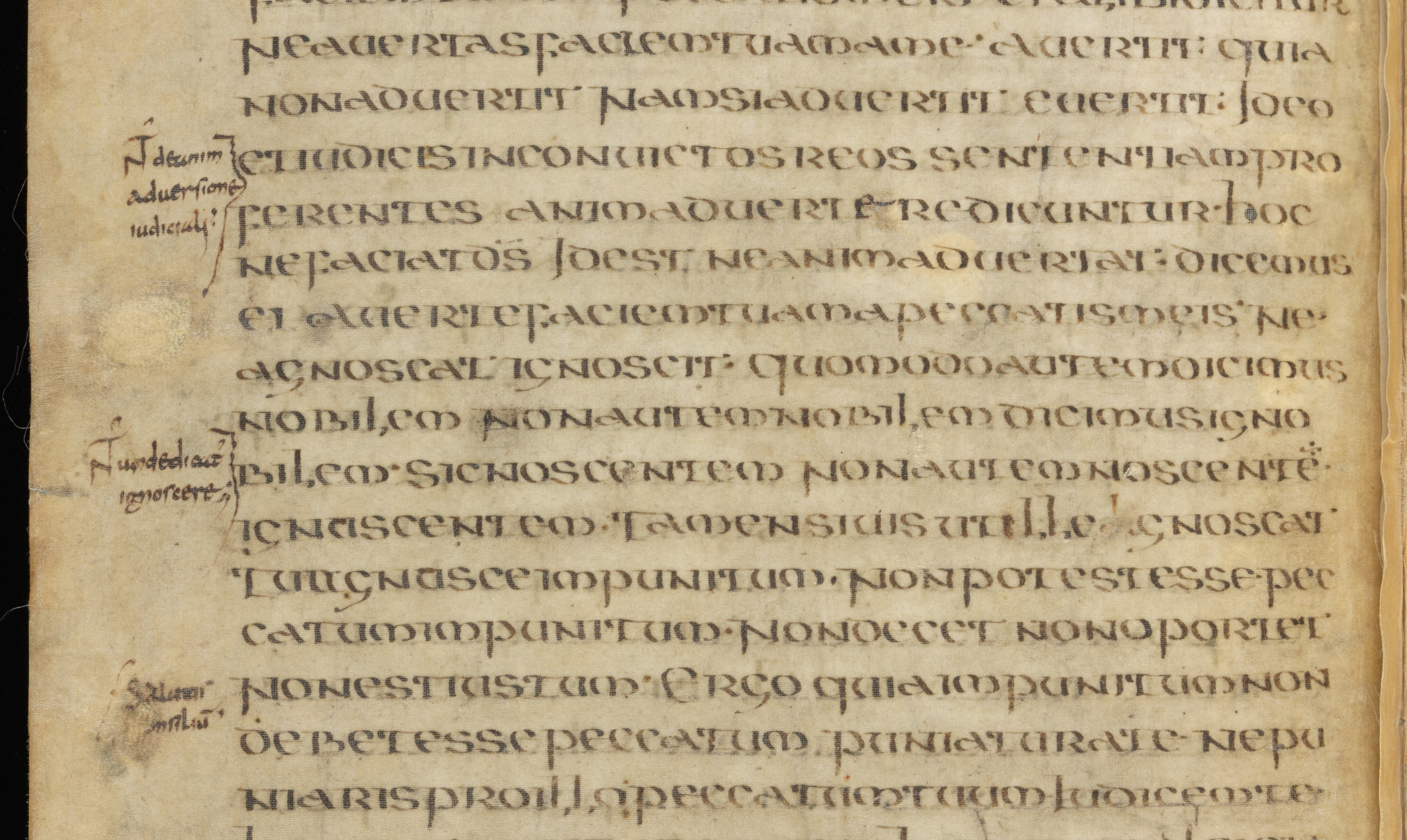 Genève, Bibliothèque de Genève, Ms. Lat. 16, f. 16v. Passage du sermon 20 de saint Augustin, avec trois notes marginales autographes de Florus de Lyon.